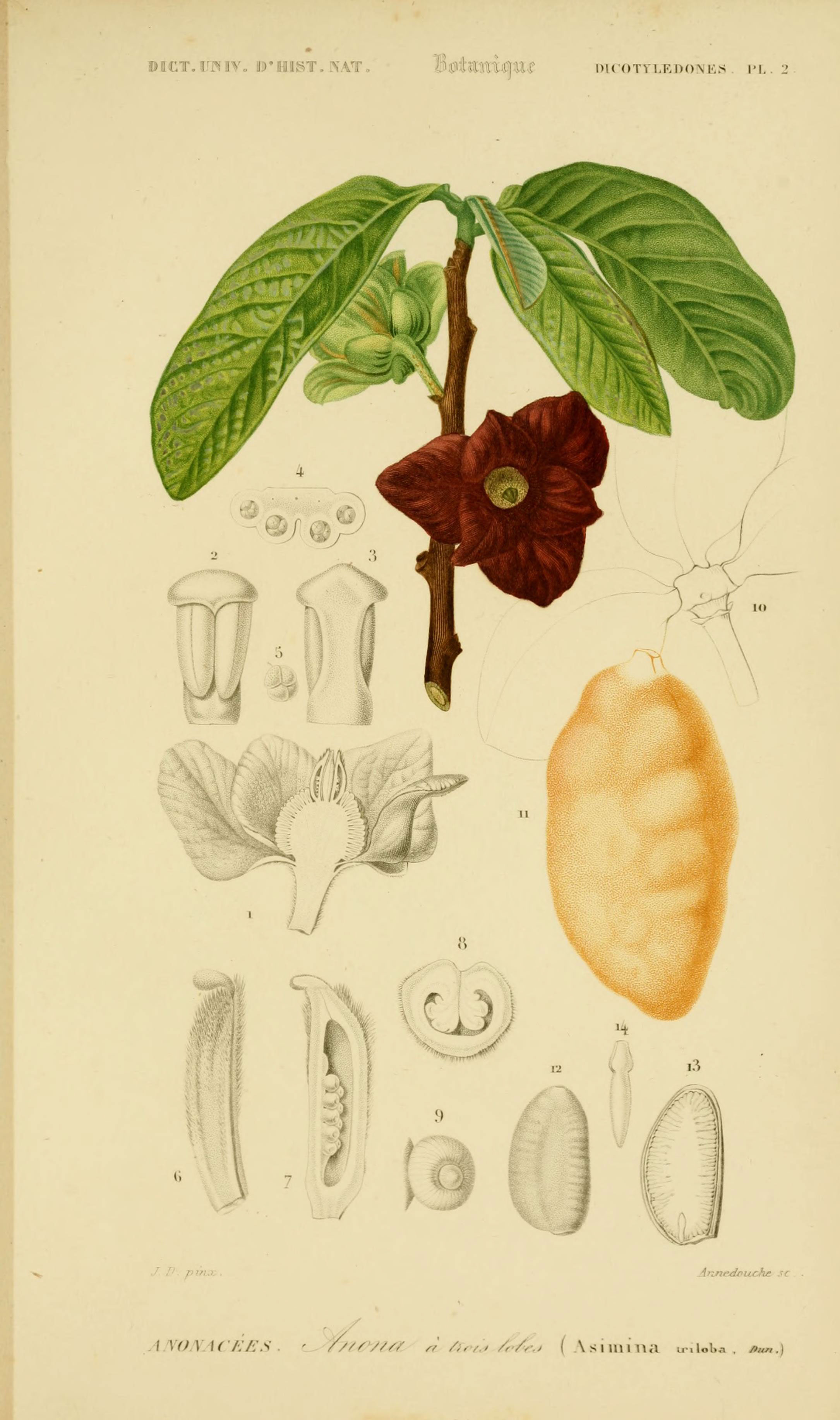 PICT, rff sv„ ur yiKST. .\at,, Bî3tTOi.(